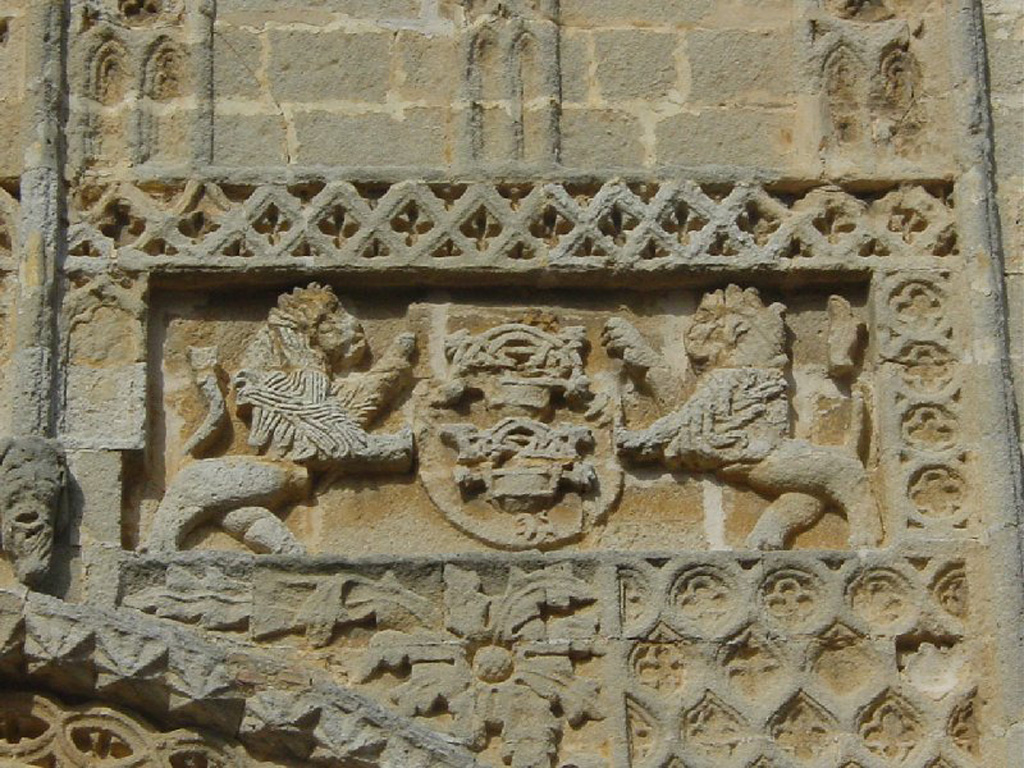 Escudo de la familia Pérez de Guzmán, Iglesia Mayor Parroquila de Ntra. Sra. de la O, Sanlúcar de Barrameda (Cádiz-Andalucía-España)